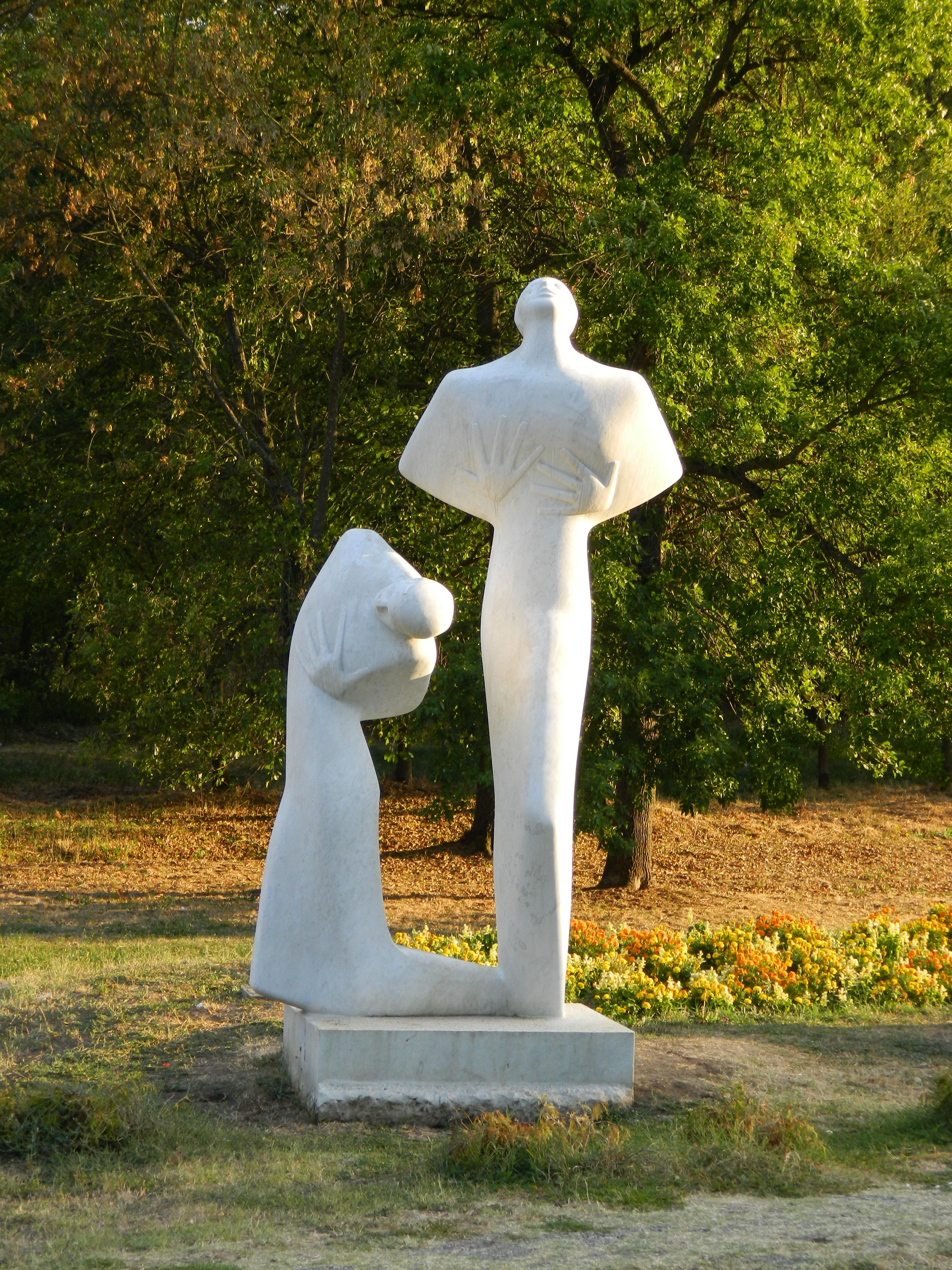 Spomen park "Kragujevački oktobar"